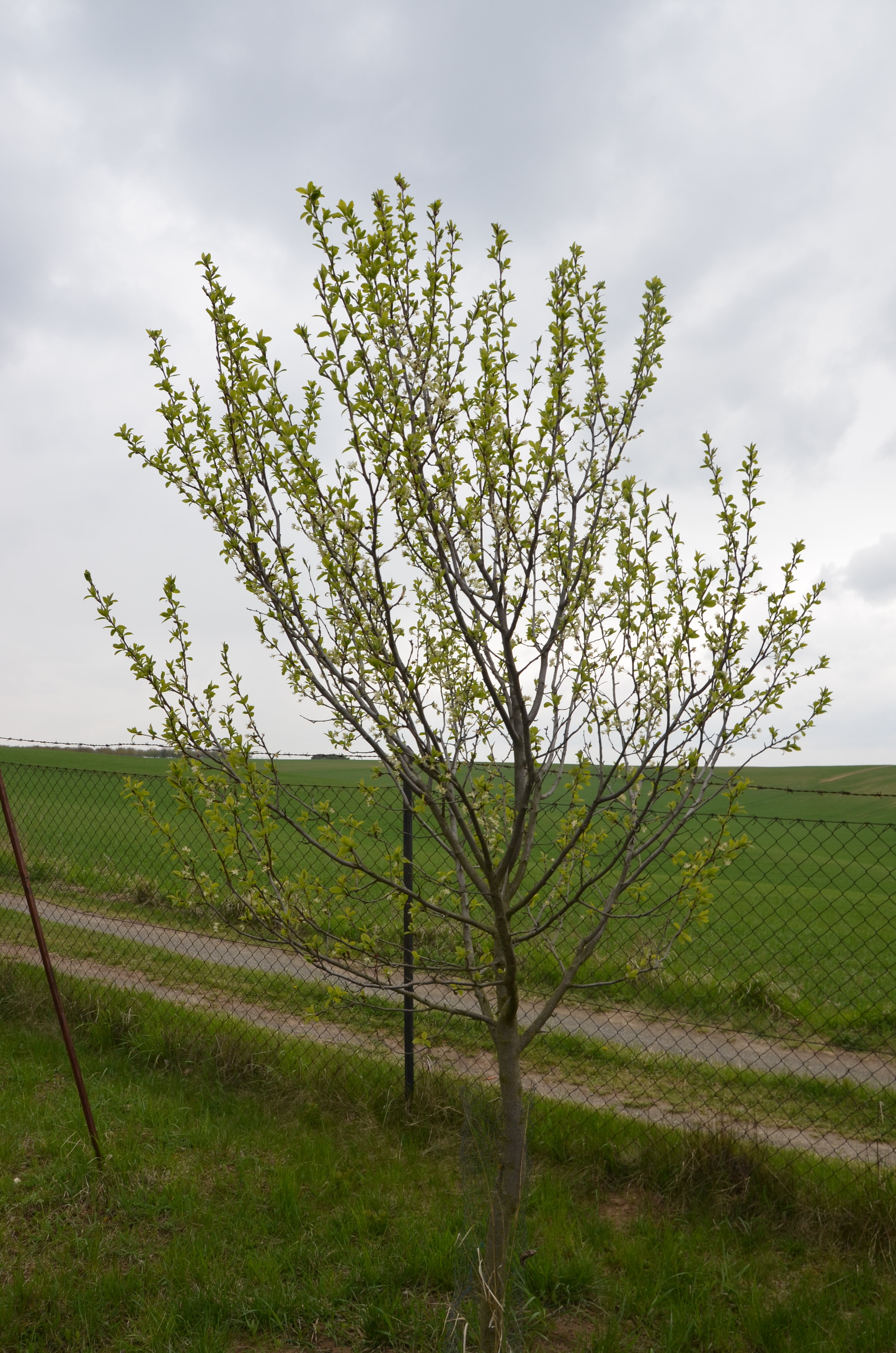 Kvetoucí šlapanická švestka na zahradě autora příspěvku Stanislava Juráně